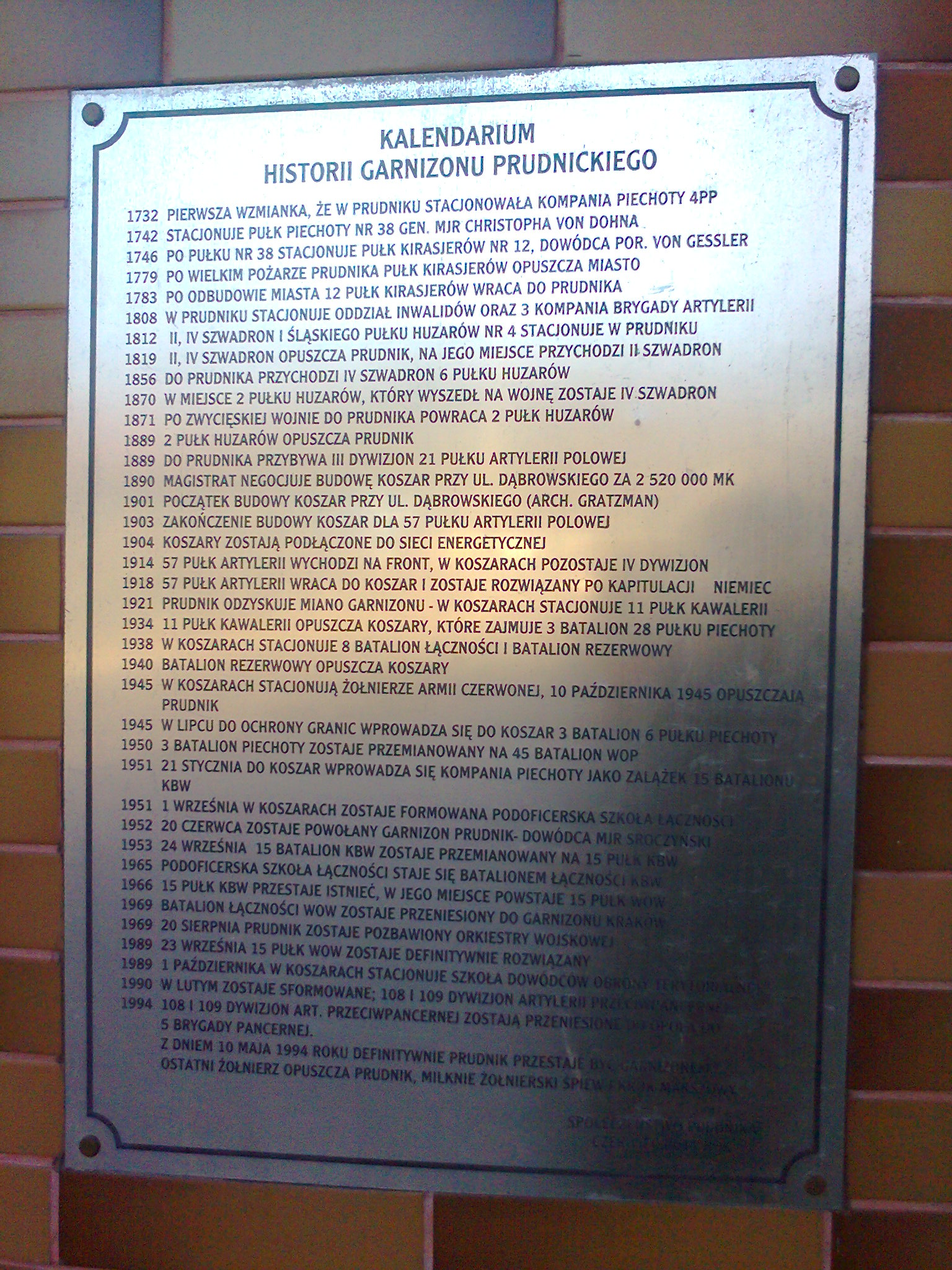 Prudnik, byłe wojskowe koszary, „Kalendarium historii garnizonu prudnickiego“, na skrzyżowaniu ulic Dąbrowskiego i Legionów